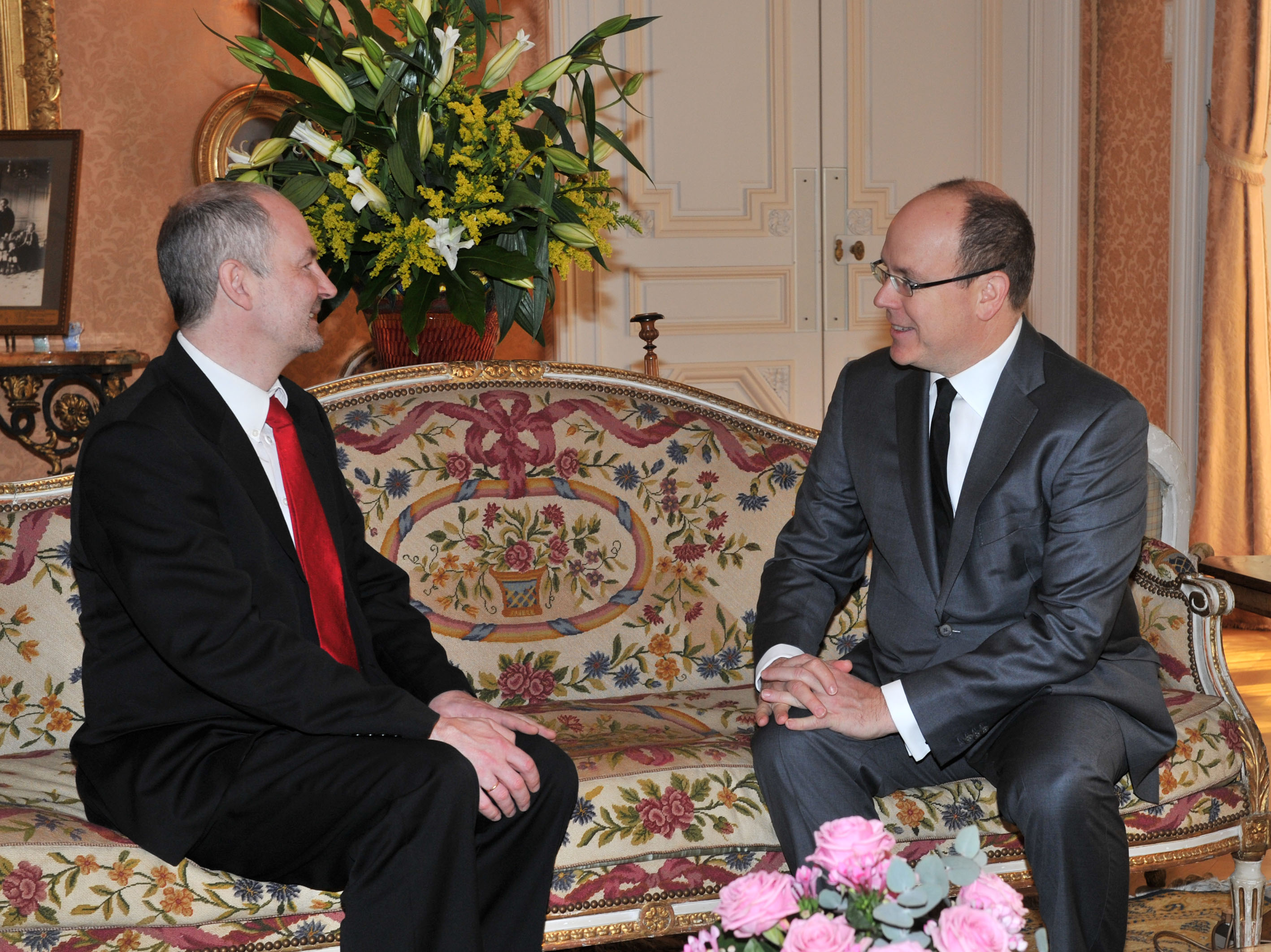 Monaco vürst Albert II ja Eesti suursaadik Monacos Sven Jürgenson